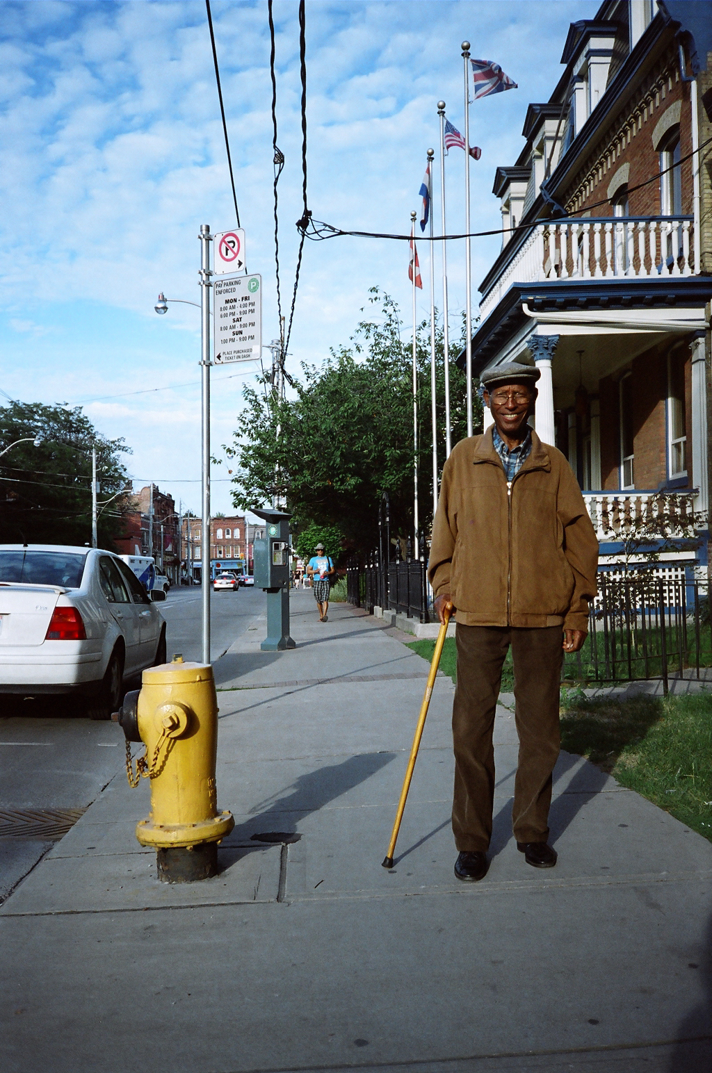 Yellow cane